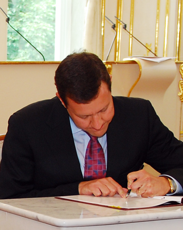 Daniel Lipšic ako minister vnútra, počas podpisu dohody o spolupráci medzi Bratislavským samosprávnym krajom a Dnepropetrovskou oblasťou